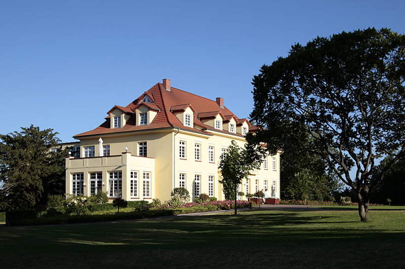 Hotel Gut Gremmelin, Landkreis Güstrow, Mecklenburg-Vorpommern, Deutschland